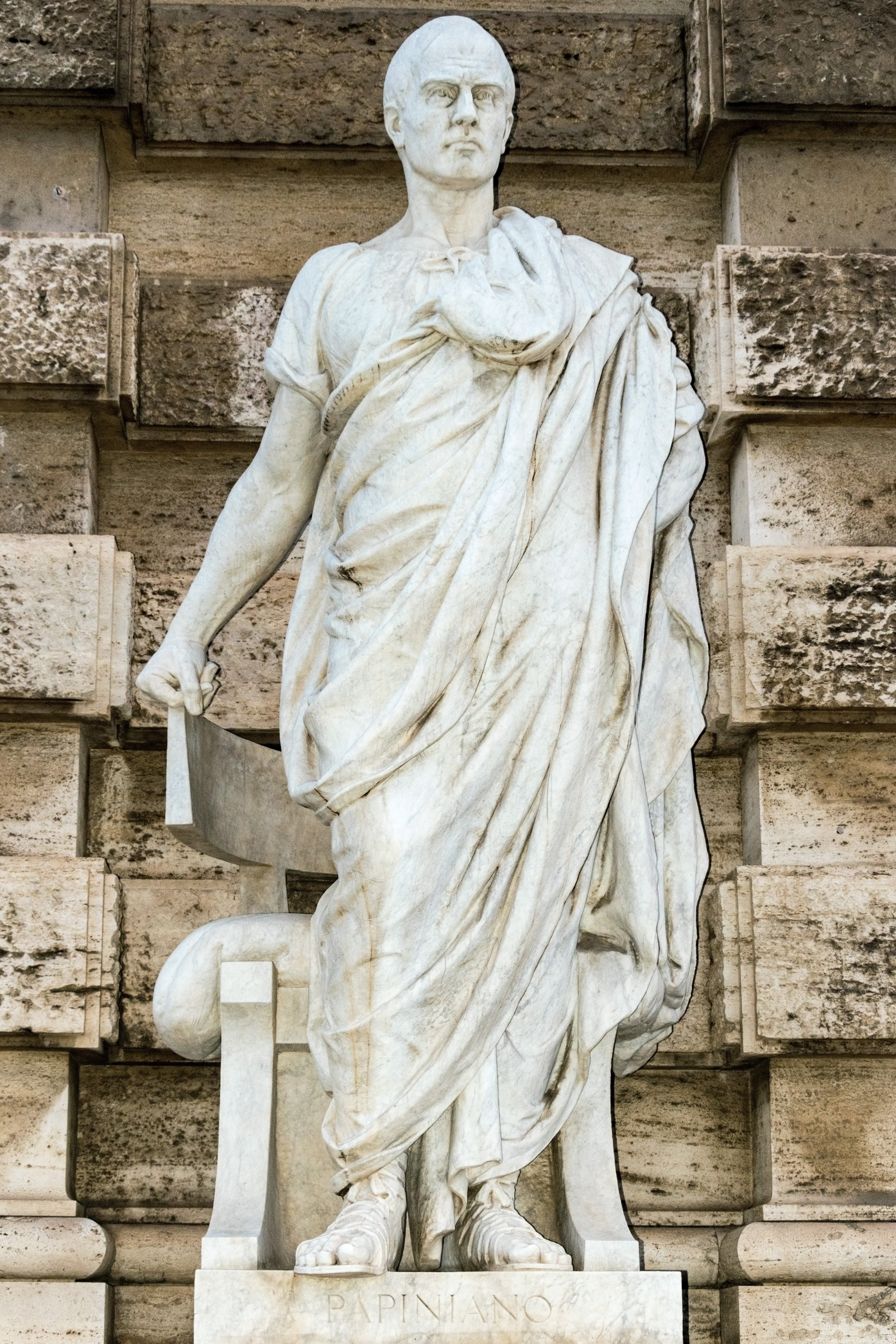 Statue des Aemilius Paulus Papinianus am Eingang zum Justizpalast in Rom